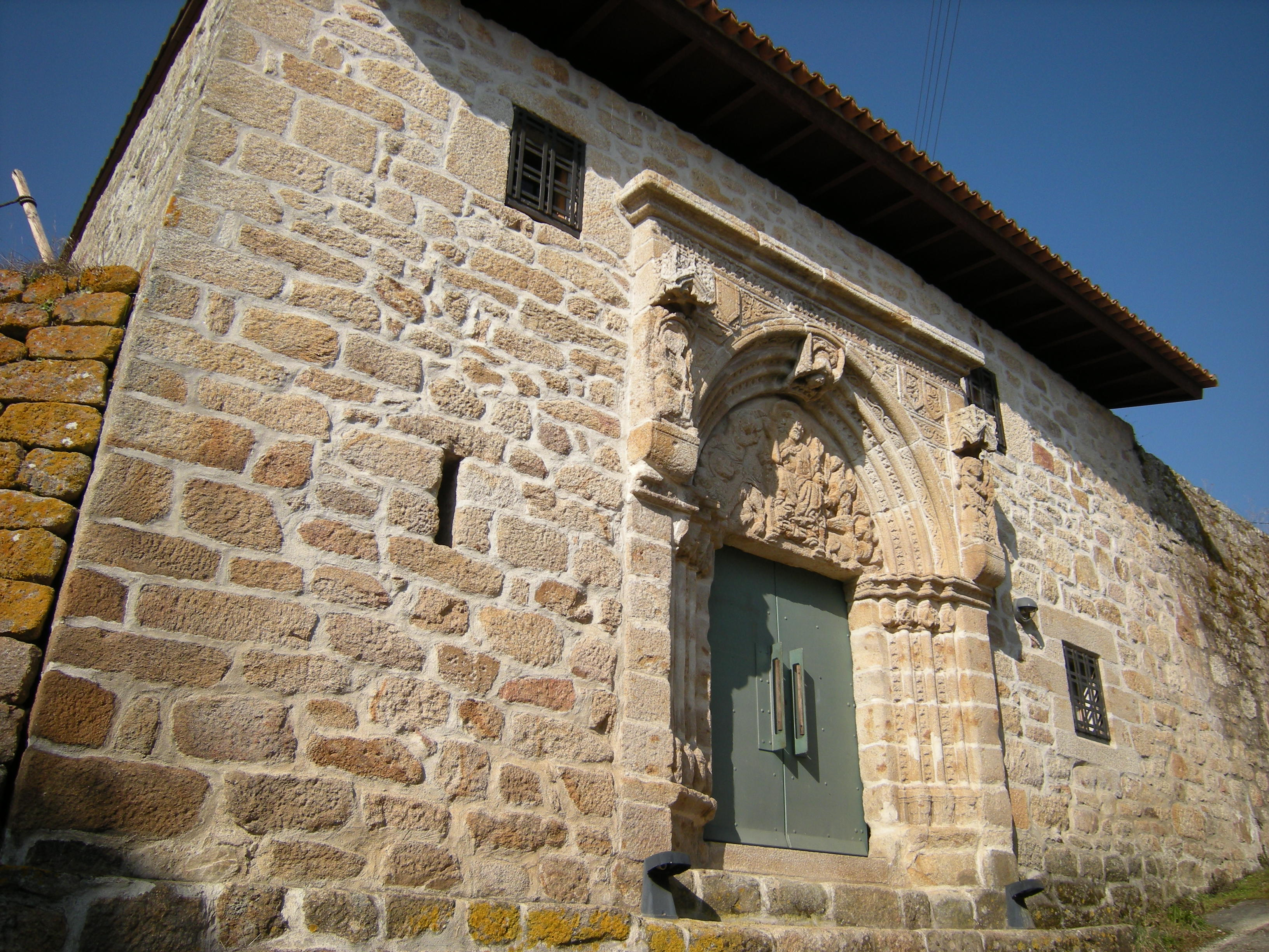 Fue mandado construir en 1391 por el abad Vasco Pérez. Lo más impresionante es su portada, en cuyo tímpano se nos muestra un Pantocrátor rodeado de los cuatro evangelistas.